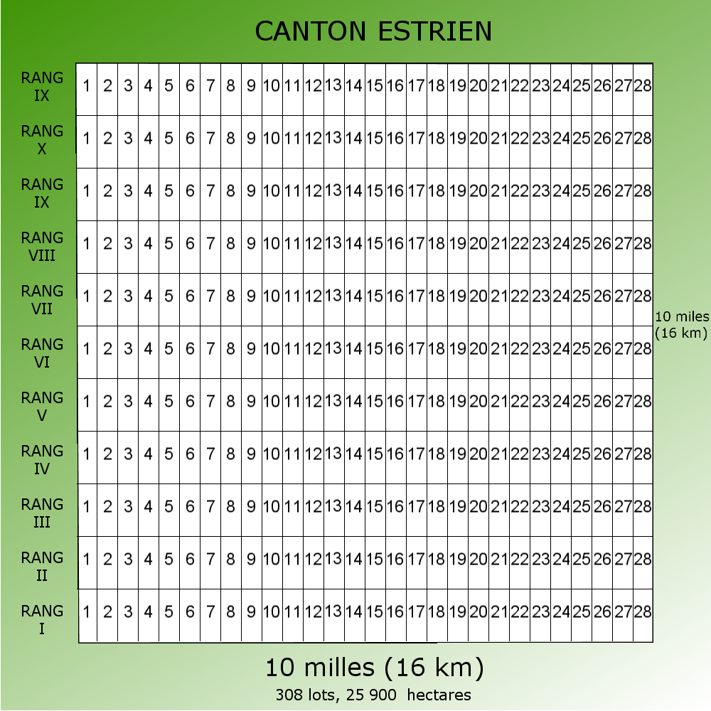 Shéma d'un canton estrien